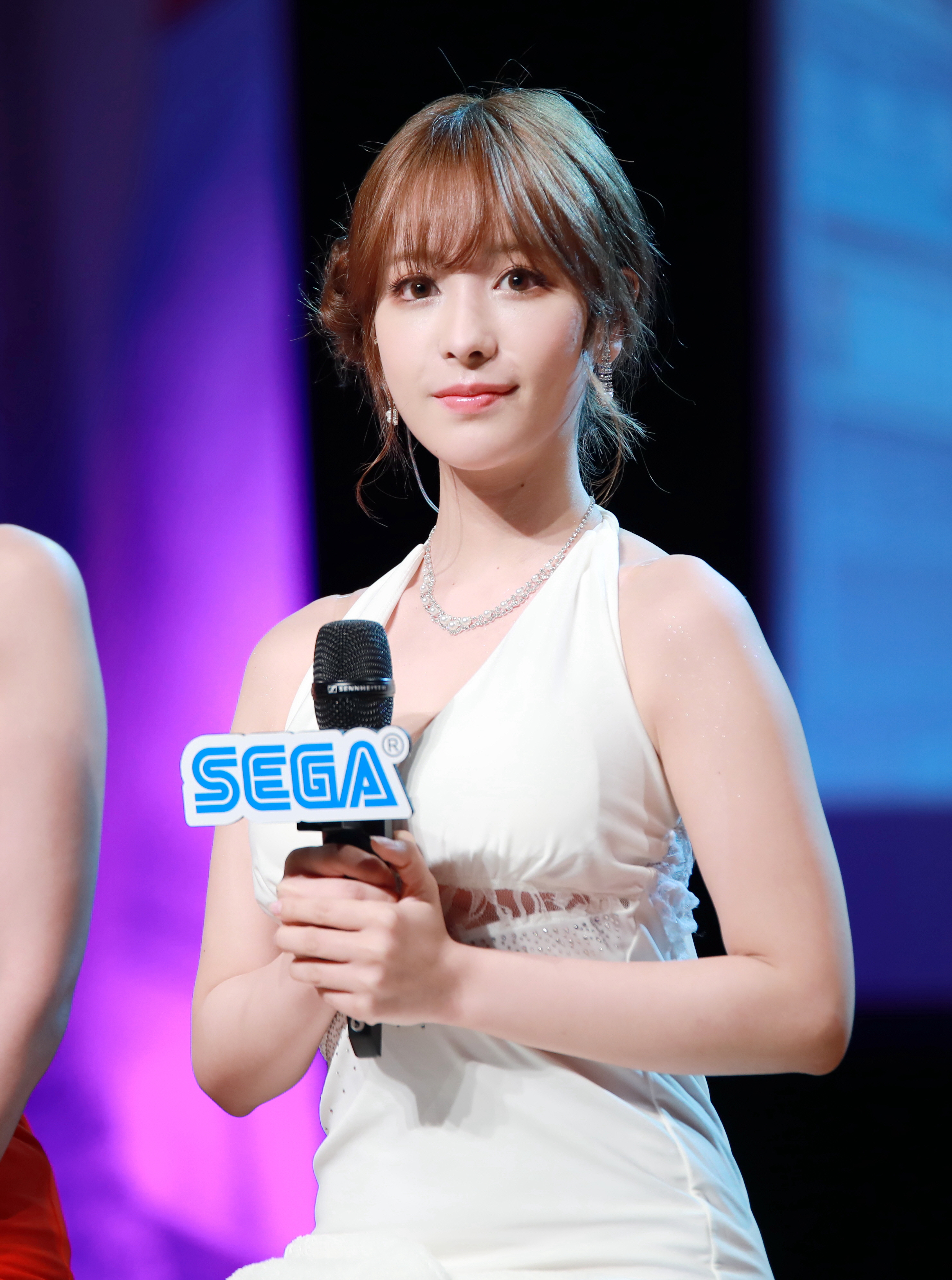 180727 龍が如く3 ファン会議2 桃乃木かな